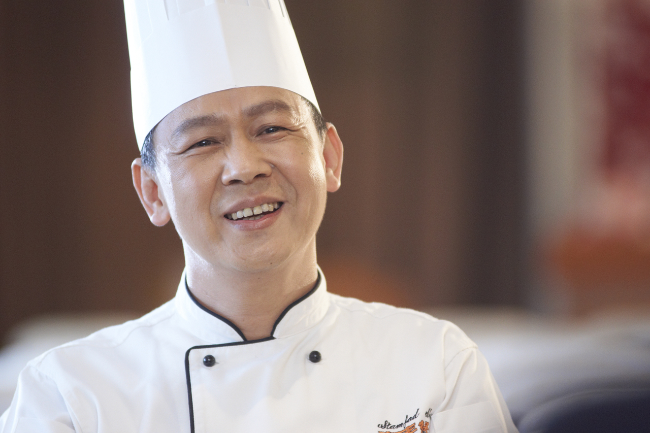 中文（台灣）: 台灣廚神阿發師